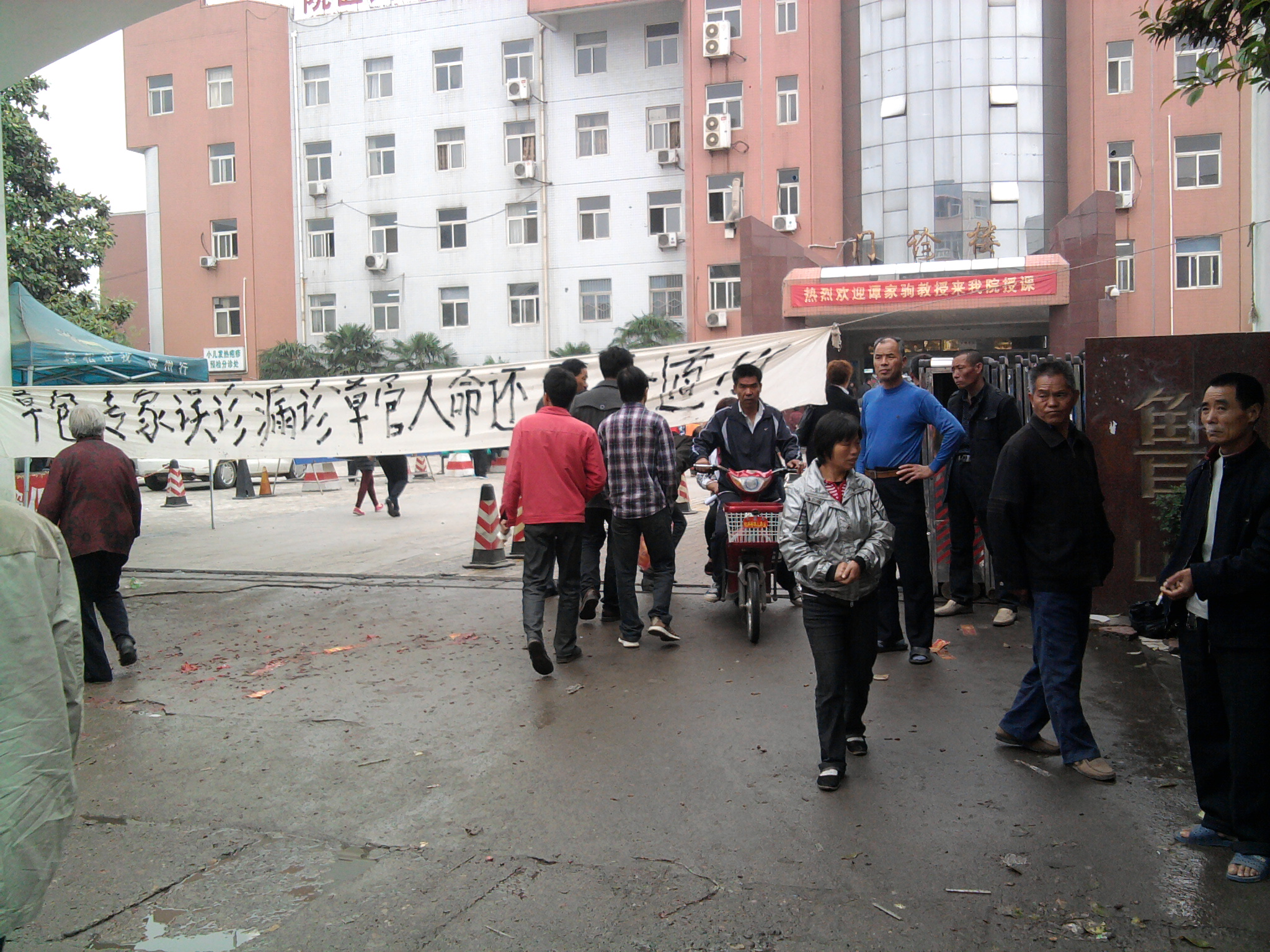 鲁山县人民医院的门口，一名患者家属在抗议.